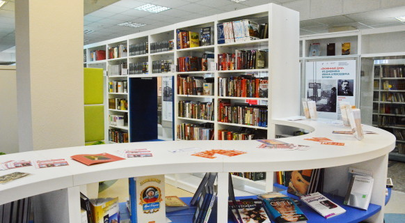 Государственное бюджетное учреждение культуры г. Москвы «Центральная универсальная научная библиотека имени Н.А. Некрасова» Главное здание Библиотеки им. Н.А. Некрасова 105005, Москва, ул. Бауманская, д. 58/25, стр. 14 (м. «Бауманская»)